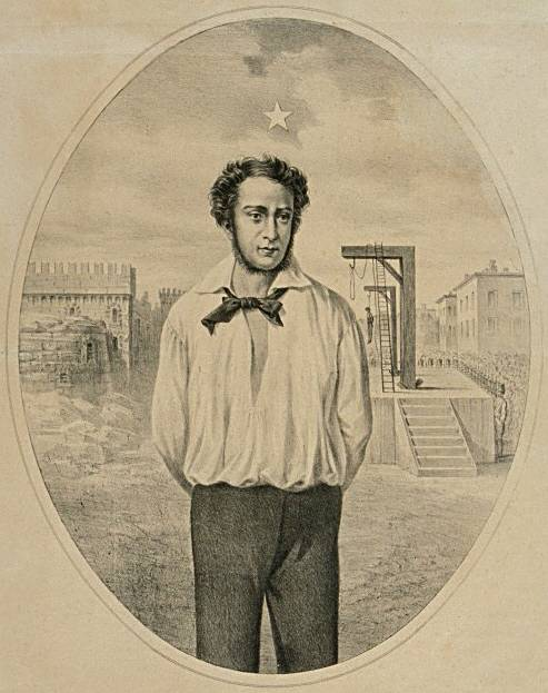 "Ciro Menotti al supplizio", ridotto, litografia